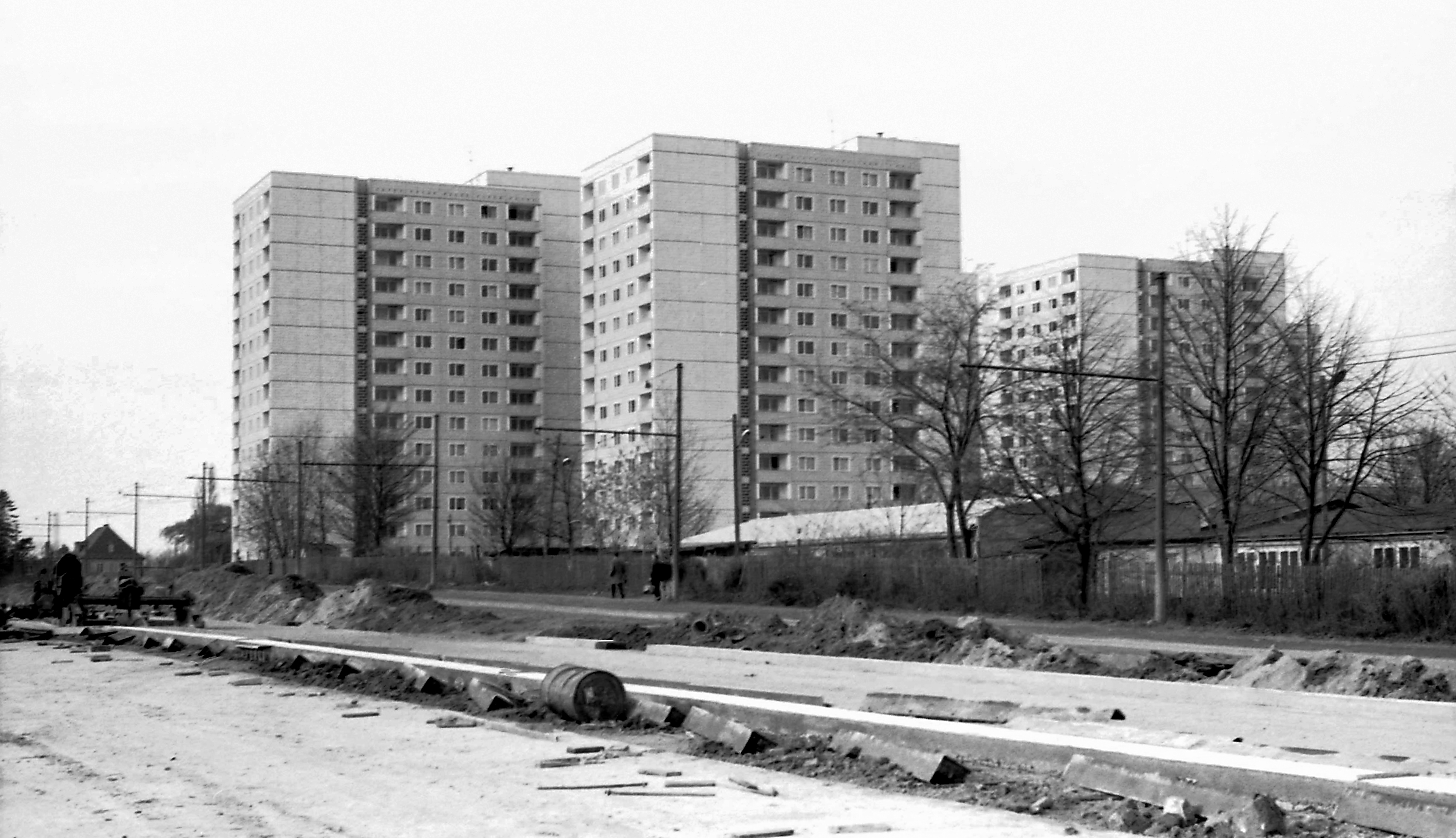 05.11.1972 DDR 8020 [01217] Dresden-Südvorstadt Ost: 17-geschossige Plattenbau-Studentenwohnheime Wundtstraße 11, 9 und 3 (GMP 51.029326,13.749463). Im Vordergrund wird der Zellesche Weg zweispurig ausgebaut. Rechts dahinter verdecken Baracken die Flachbauten der Arbeiter-Bauern-Fakultät Zellescher Weg 41a-d. Sicht von Südosten. [F19721021A64.JPG]19721105020NR.JPG(c)Blobelt